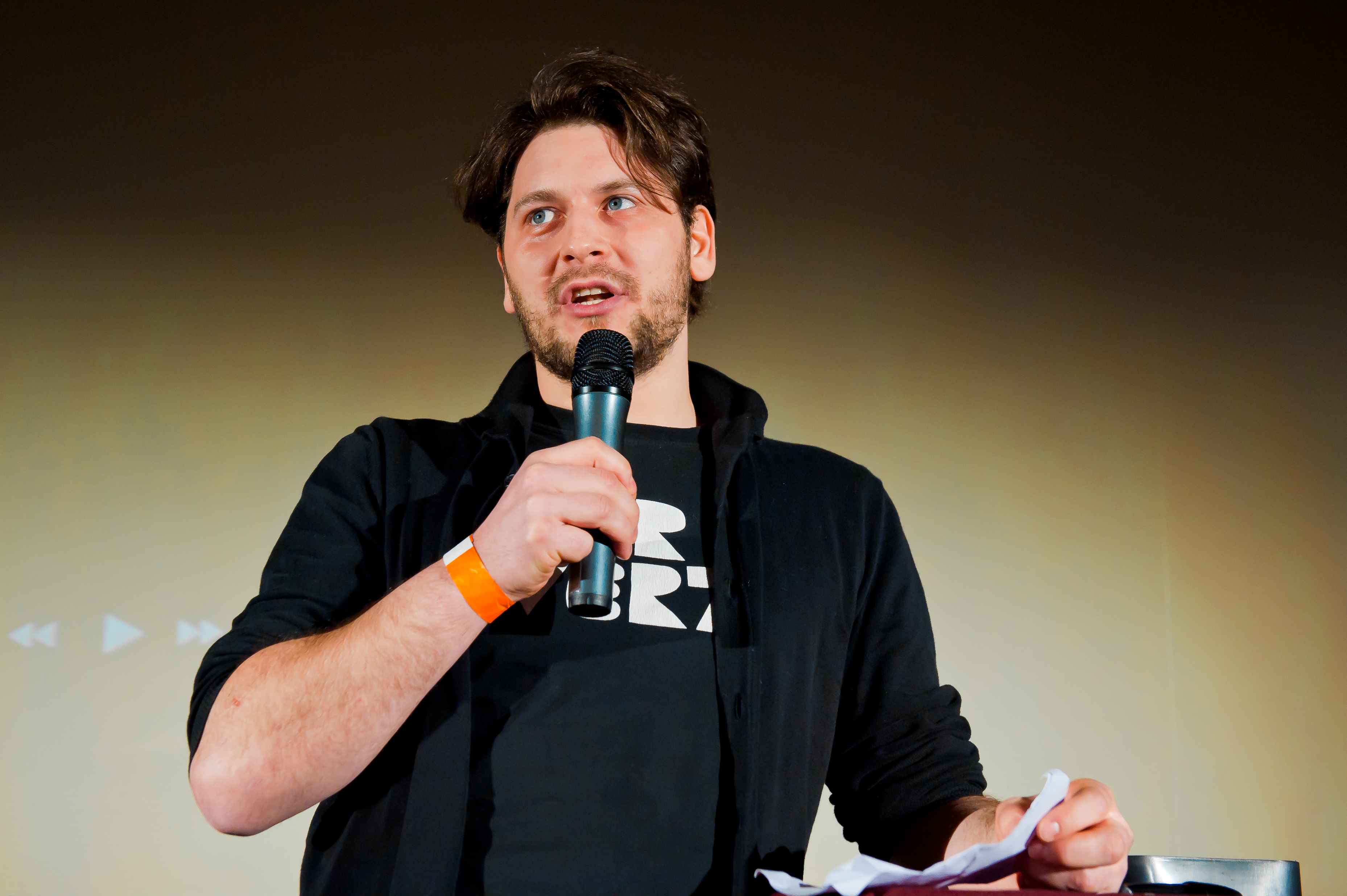 Simon "Bimon" Krätschmer hält die Laudatio in der Kategorie Serie beim Deutschen Webvideopreis 2011